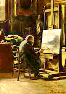 Portret van P.F. Peters jr. (1893) door Pietronella Peters